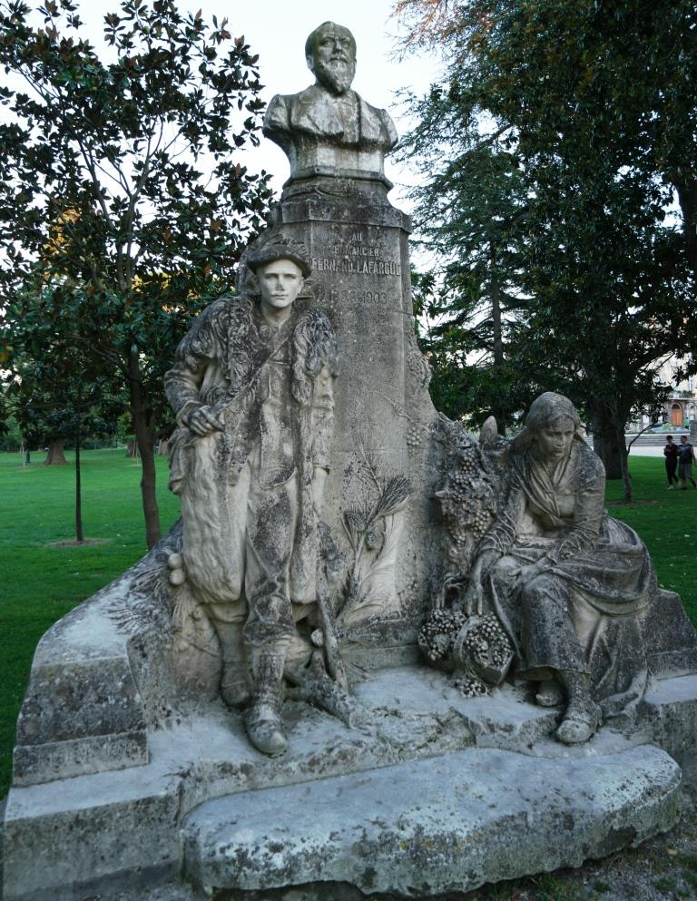 Denkmal für den Schriftsteller Jean Fernand-Lafargue (1856-1903) im jardin public de Bordeaux